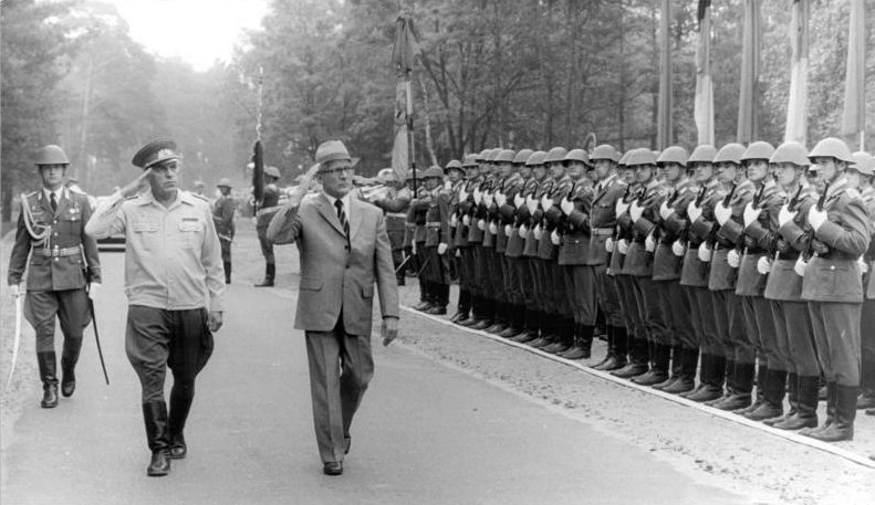 DDR, NVA-Truppenbesuch, Honecker ADN-ZB Mittelstädt 21.6.84 DDR: Truppenbesuch- Der Generalsekretär des ZK der SED und Vorsitzender des Staatsrates der DDR, Erich Honecker, Vorsitzender des Nationalen Verteidigungsrates der DDR, unternahm einen Truppenbesuch bei den Landstreitkräften der NVA. Er schritt an der Seite von Generaloberst Horst Stechbarth, Chef der Landstreitkräfte, die Front der Ehrenkompanie aus dem MotSchützenregiment 3 "Paul Hegenbart" (MSR-3) in Brandenburg ab. Abgebildete Personen: Honecker, Erich: Staatsratsvorsitzender, Generalsekretär des ZK der SED, DDR (GND 118553399) Stechbarth, Horst: Stellvertreter des Ministers (für Nationale Verteidigung) und Chef Kommando Landstreitkräfte, Generaloberst, DDR (GND 132130920 )